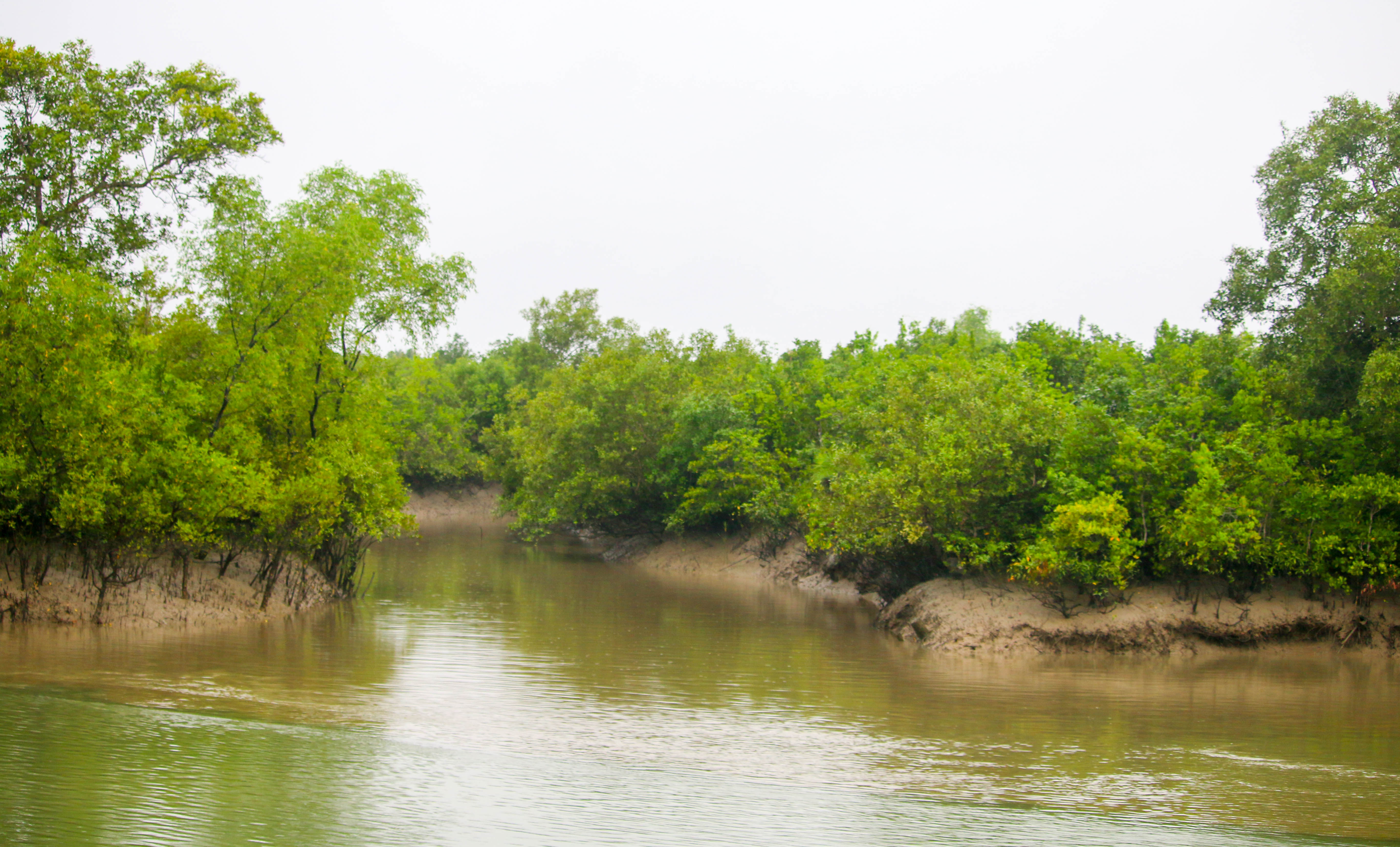 সুন্দরবন পশ্চিম বন্যপ্রাণী অভয়ারণ্য